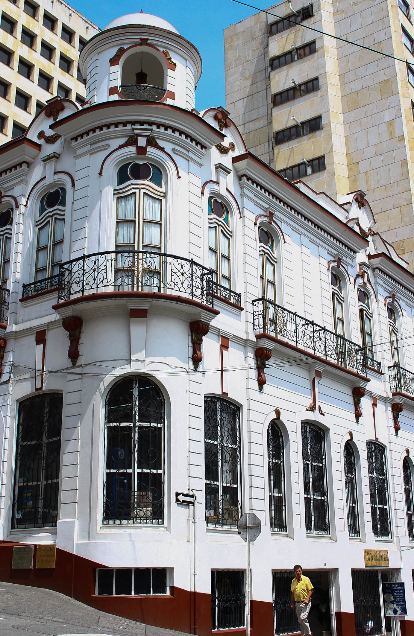 Conjunto de Inmuebles de Arquitectura Republicana localizados en el Centro de Manizales